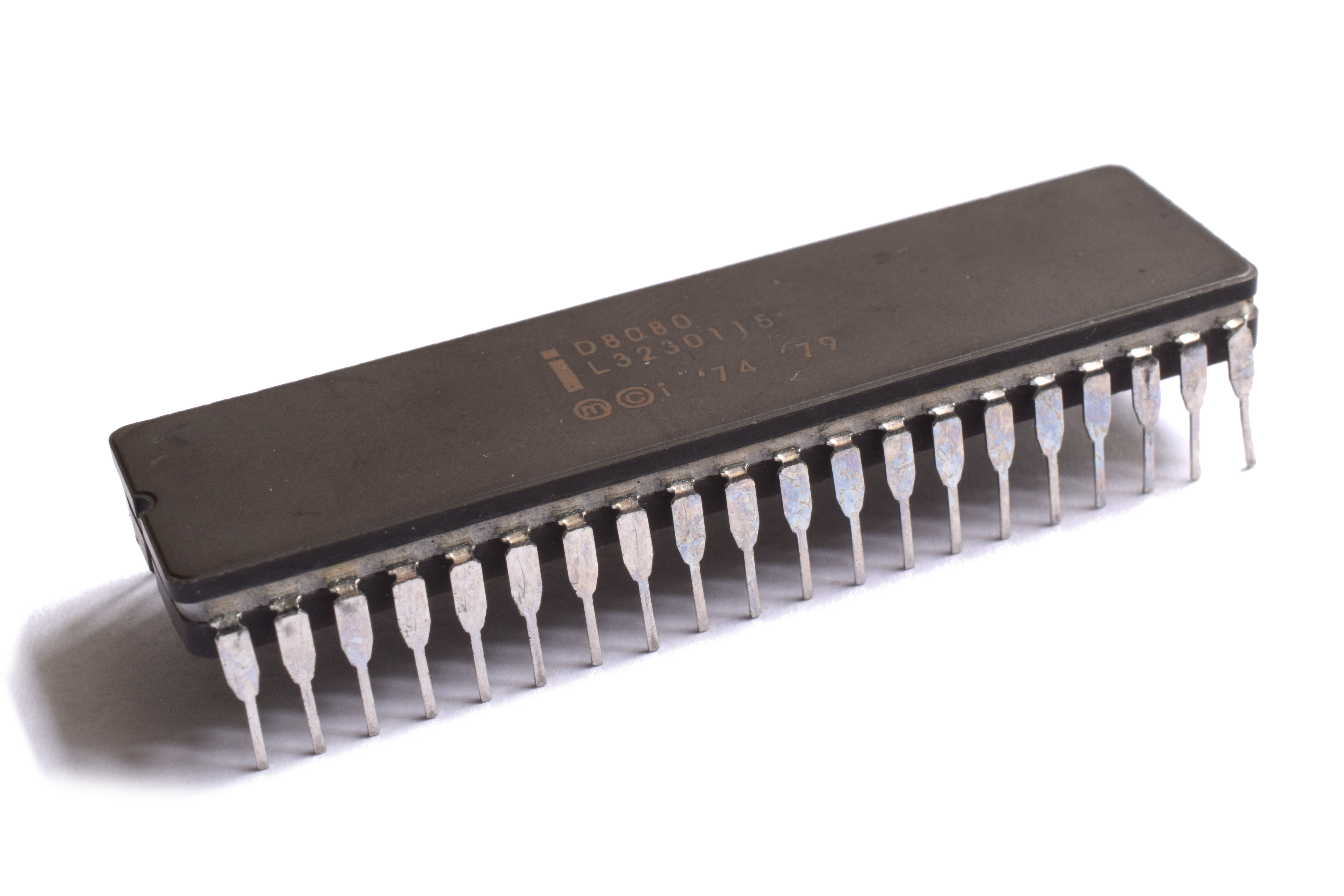 Procesoro Intel D8080.